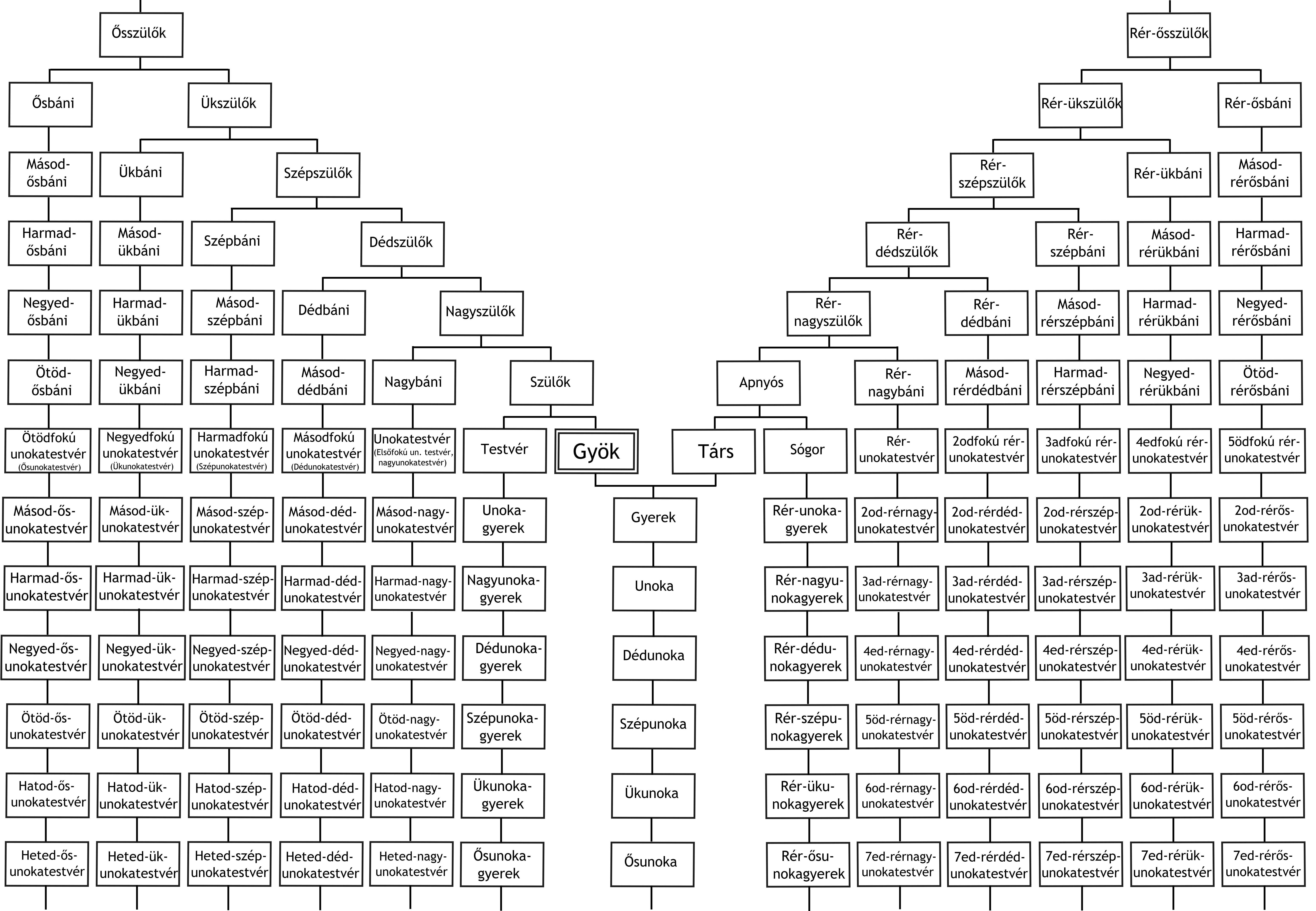 A teljes rokonság (vér- és sógorsági rokonság) genenalógiai alapsémája. Szegedi László: Általános genealógia. Budapest, 2015. 124. (1. préselés) The Hungarian genenalogical terminology of whole kinship (blood relatives and in-laws) by László Szegedi (Általános genenalógia. Budapest, 2015. p. 124.)